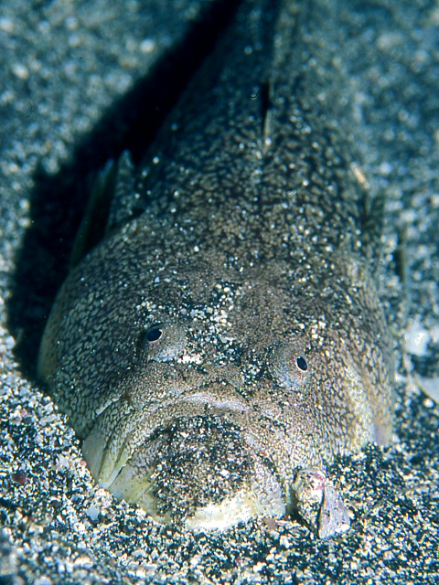 キビレミシマ Uranoscopus chinensis